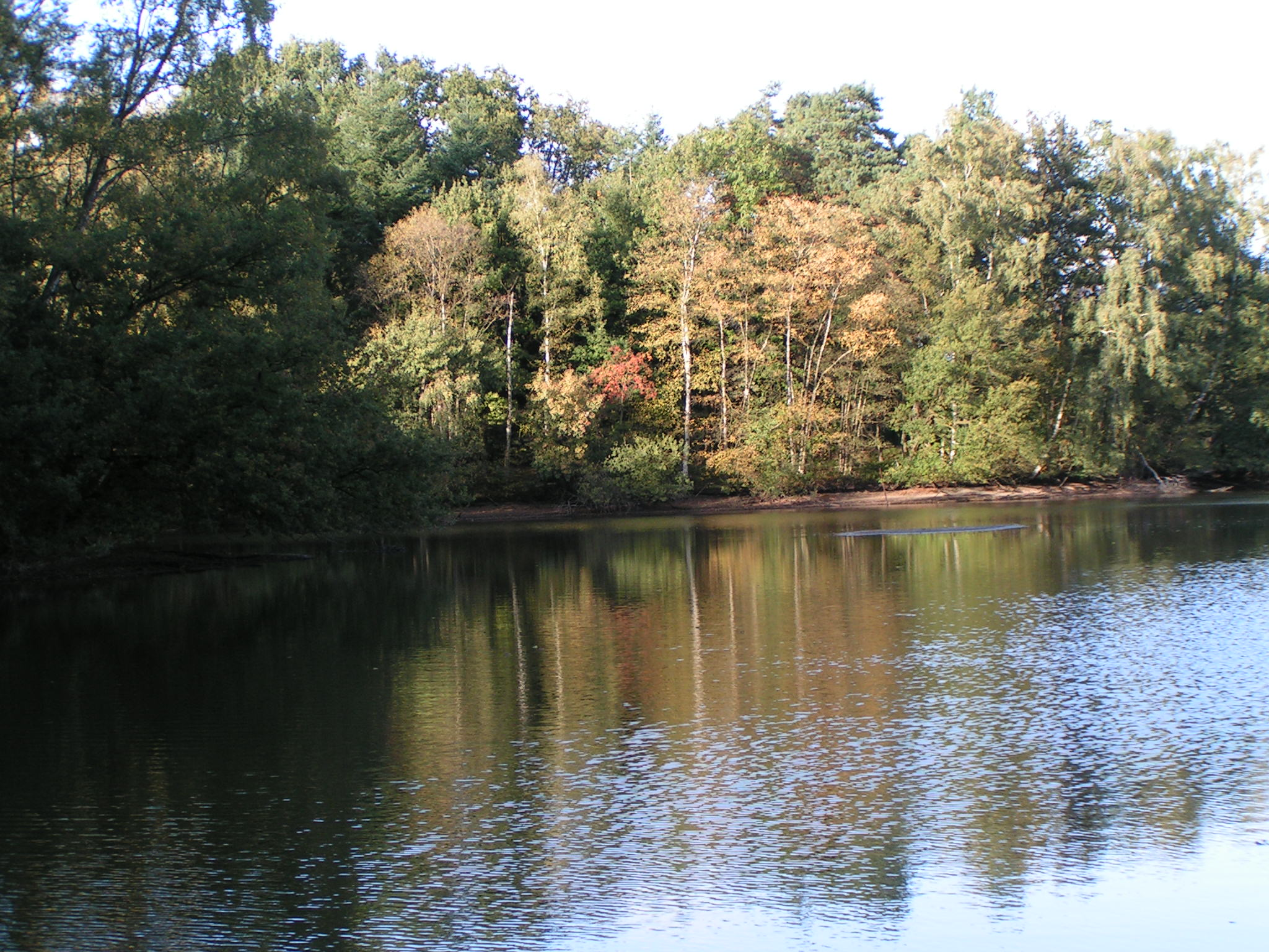 Ahlhorner Fischteich